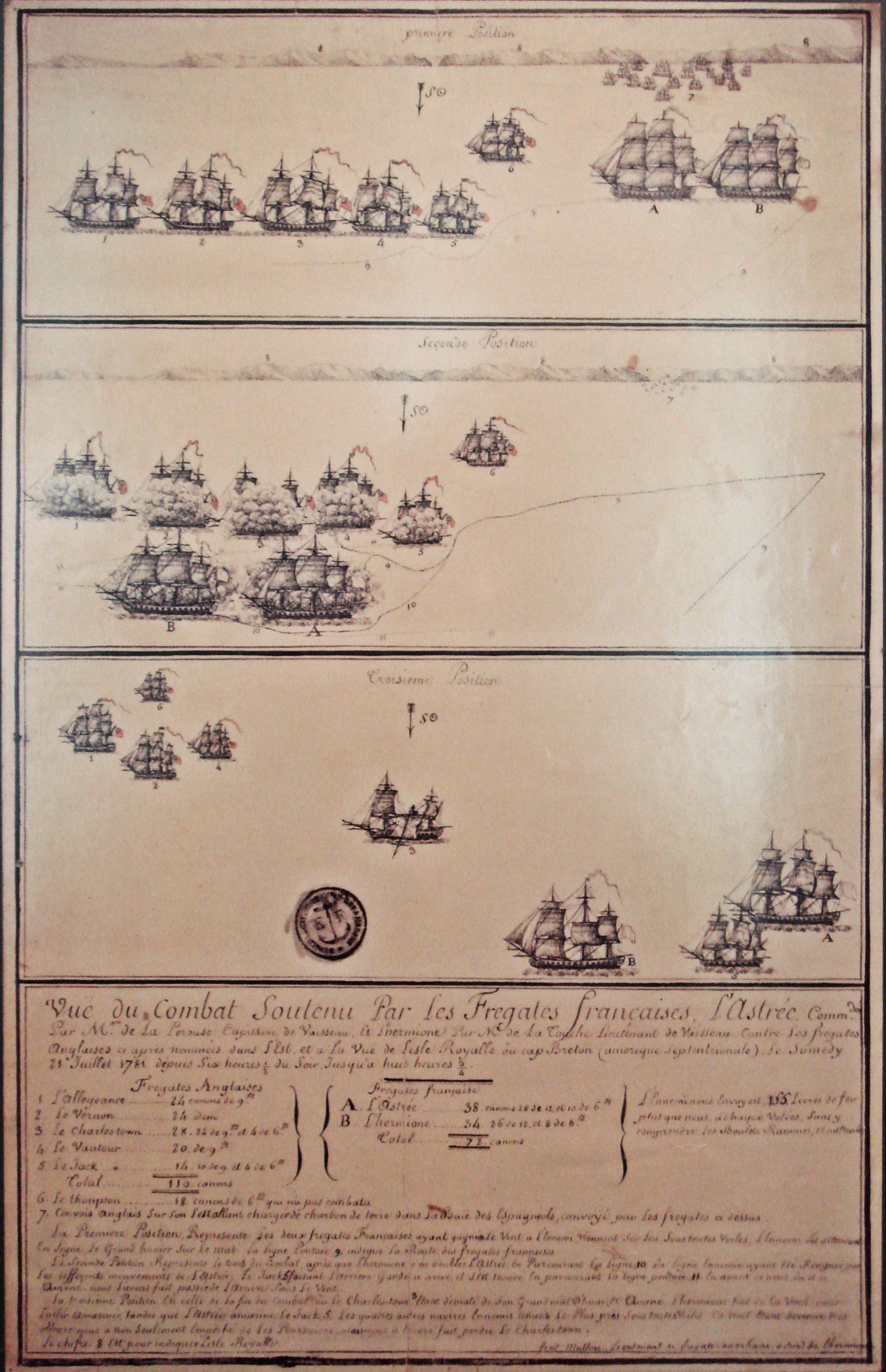 Combat_de_Louisbourg_21Juillet_1781Lieutenant_de_Fregate_auxillaire_Mullon